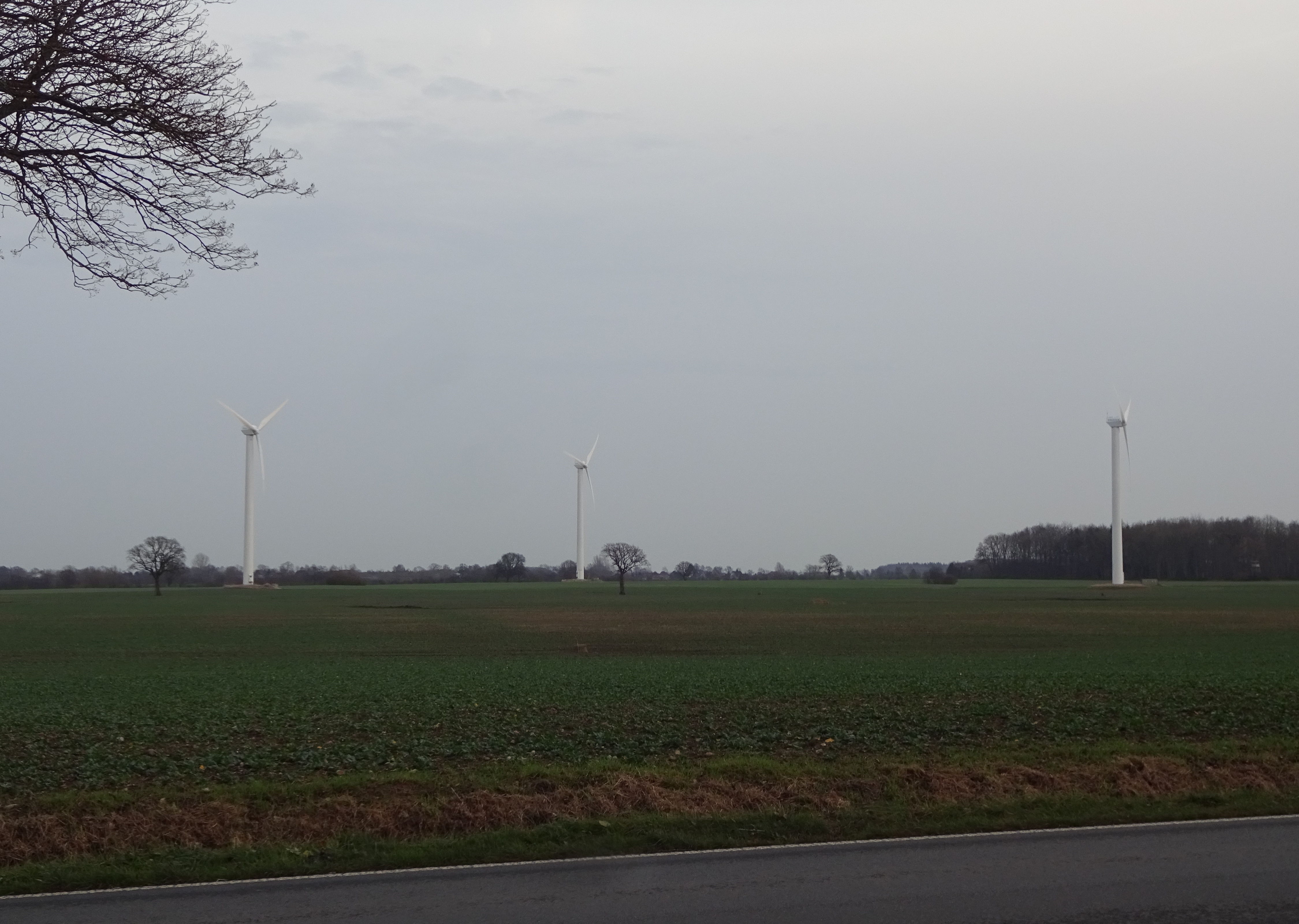 Die drei Tacke-Windkraftanlagen in Rabenholz